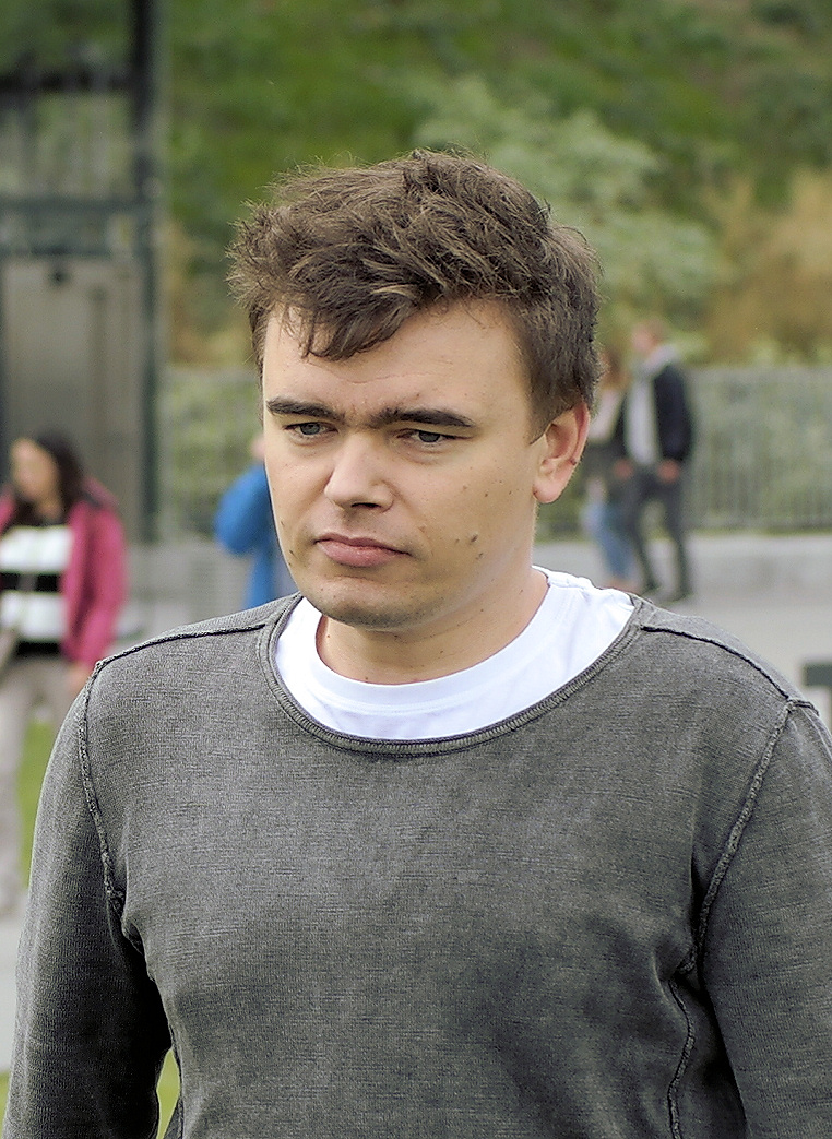 Reżyser Jan P. Matuszyński, Festiwal Filmowy w Gdyni 2016